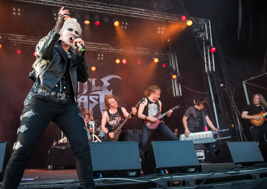 Sweden Rock Festivali 2015